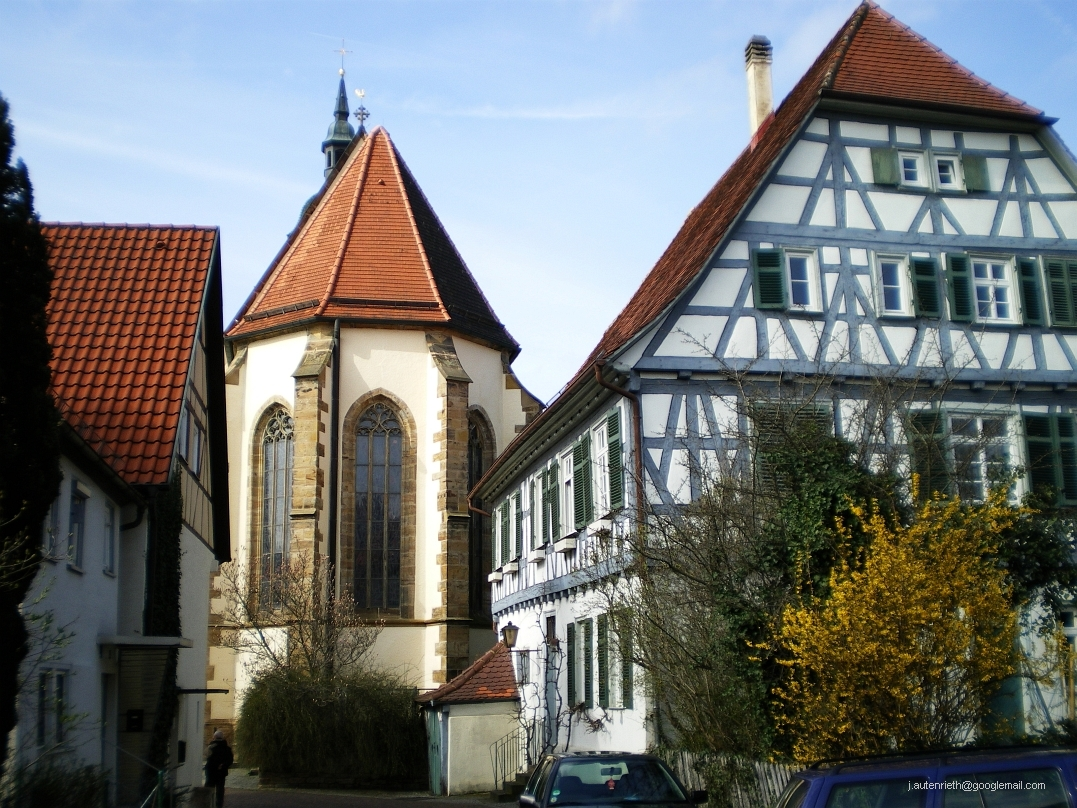 Pfarrhaus, Weilheim an der Teck